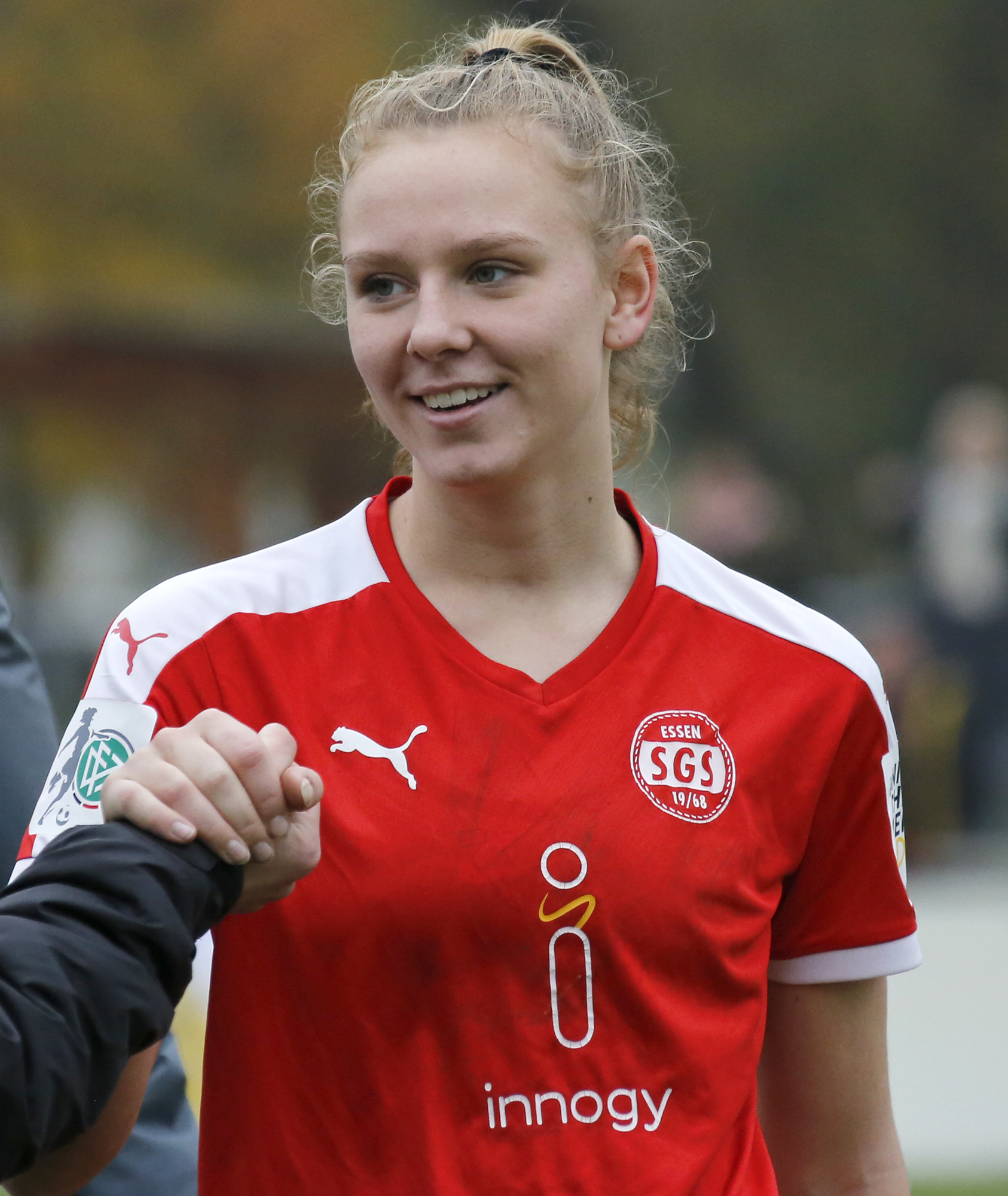 Annalena Rieke